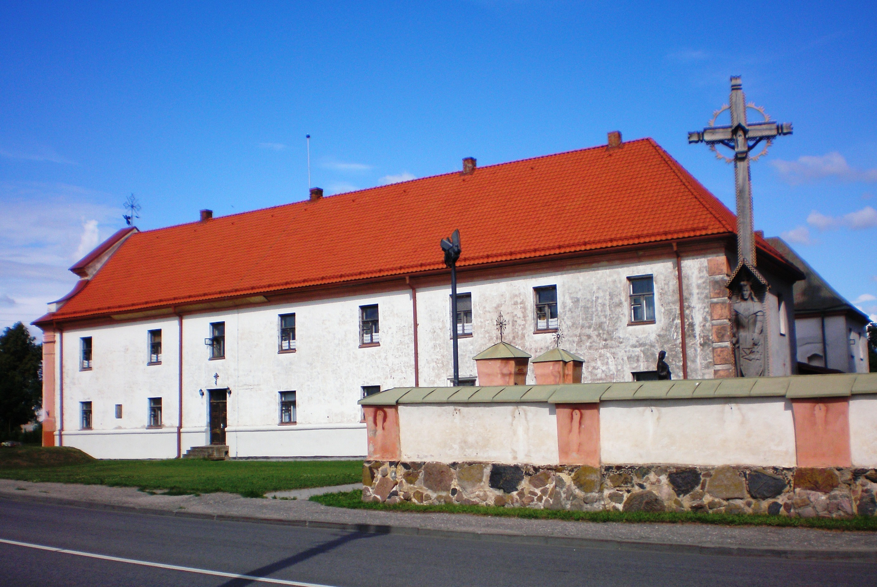 Dotnuvos vienuolynas, Kėdainių raj.